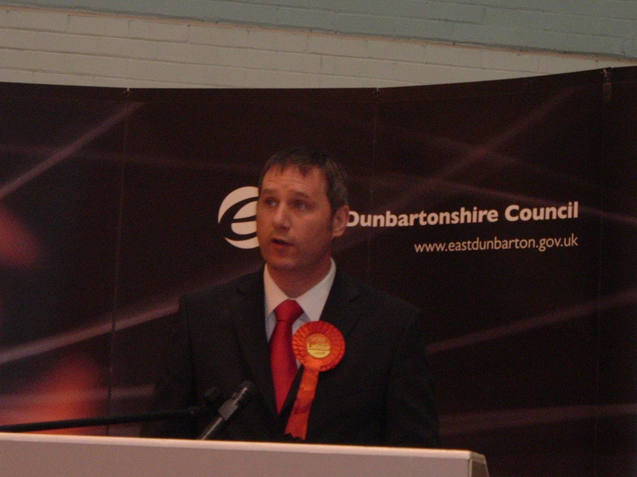 Cllr.Stewart MacDonald